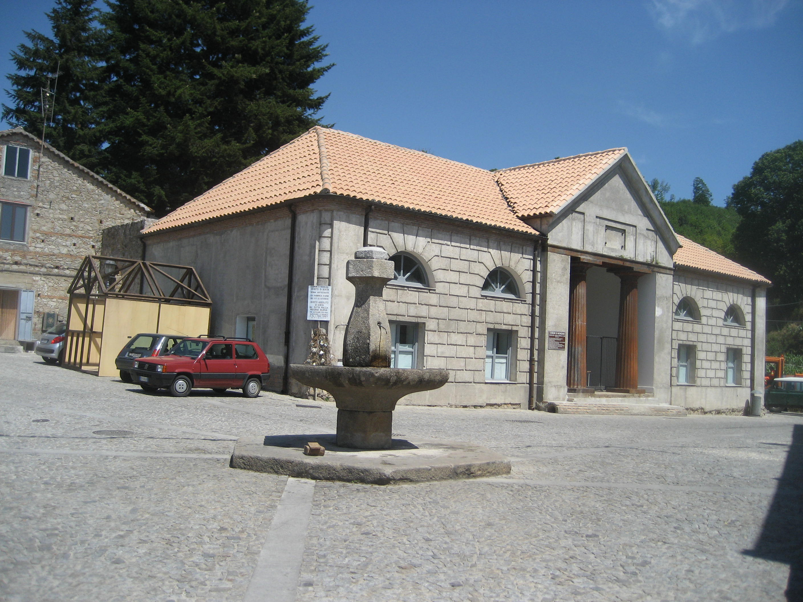 Fabbrica d'armi di Mongiana